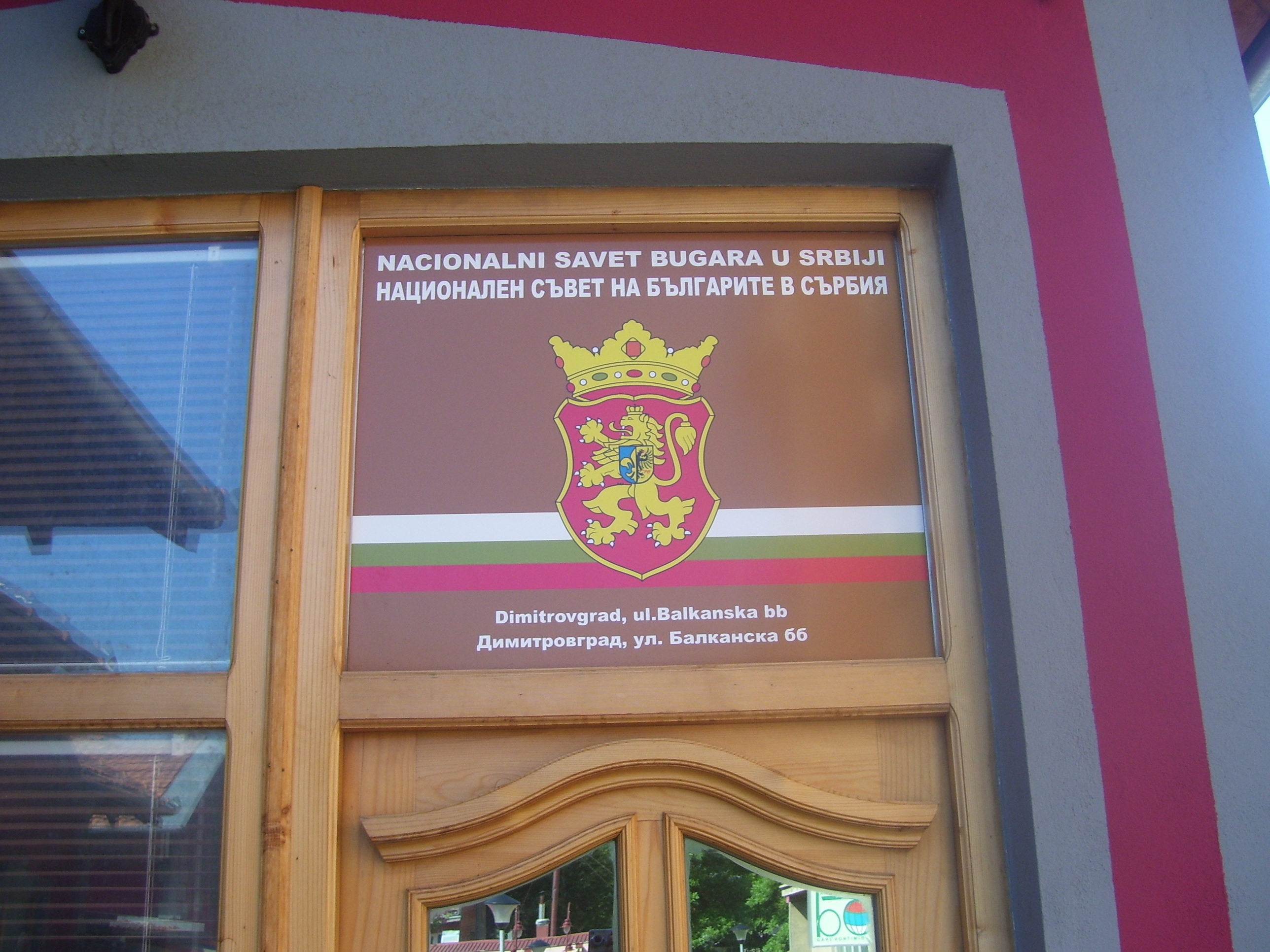 Сградата на Националния съвет на българите в Сърбия в Цариброд.